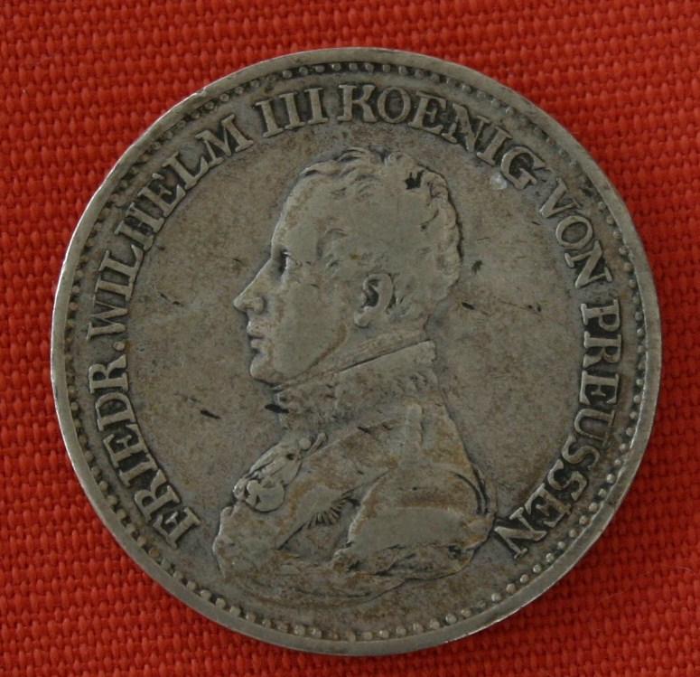 Thaler Friedrich Wilhelm III von 1819